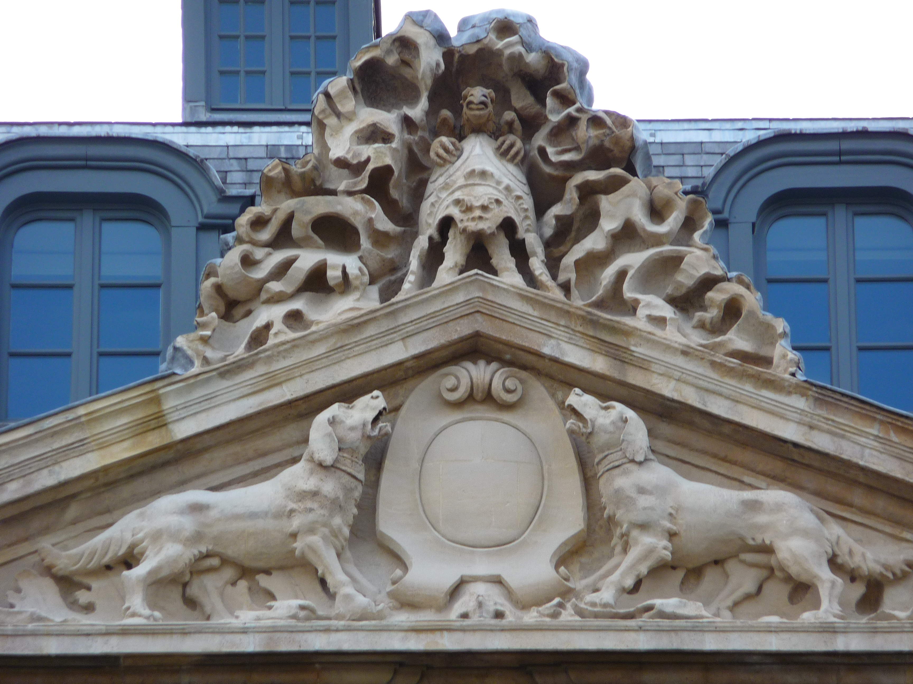 Chiens hurlant après une stryge au pattes griffues surmontant le casque au-dessus du fronton de la façade sur jardin de l'Hôtel Salé (musée Picasso) à Paris.